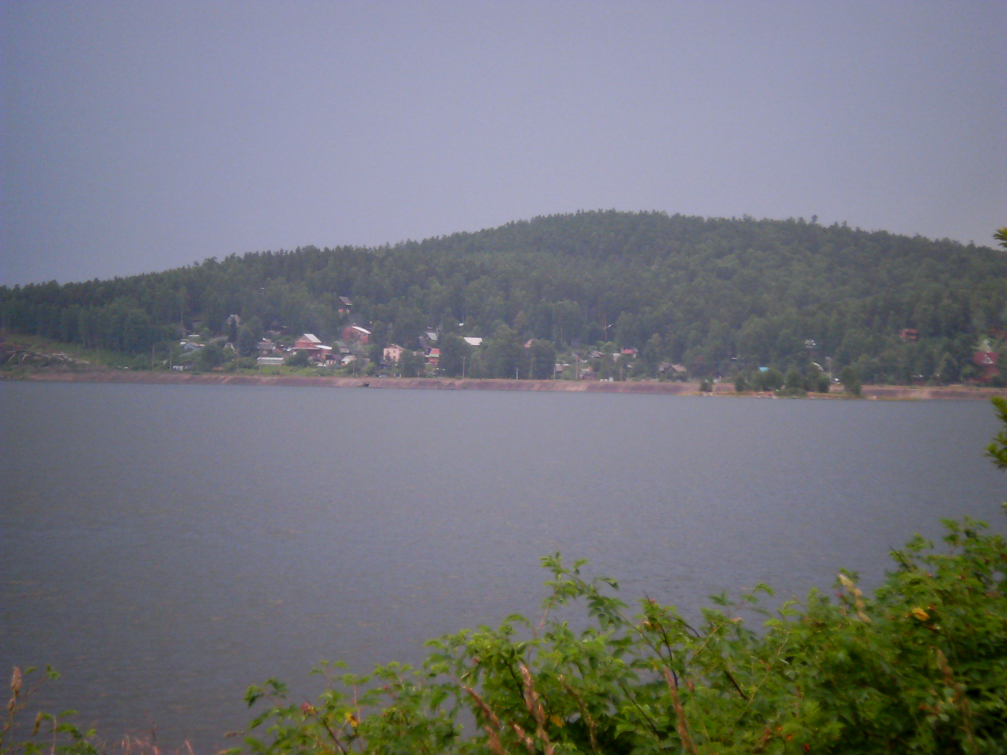 Volchihinskoye vdhr.